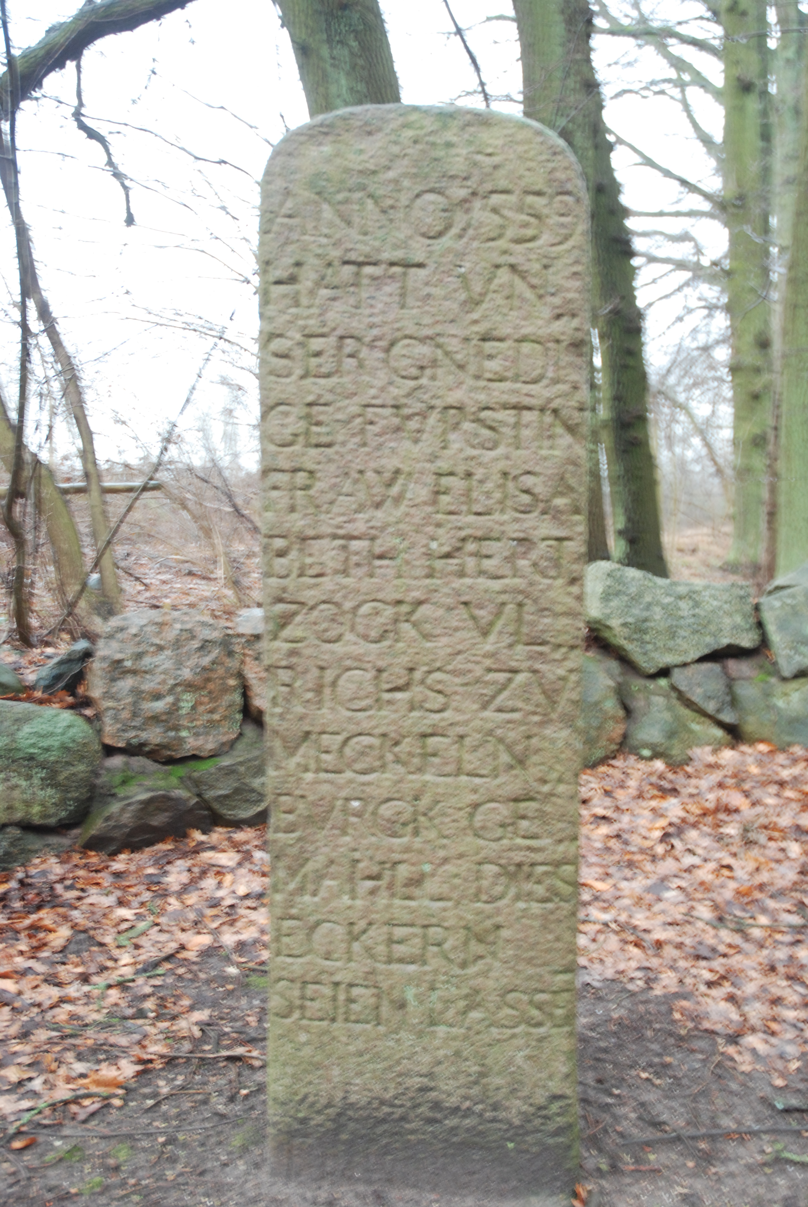 Gedenkstein von 1559 in Waldeck, Gemeinde Plüschow, an der B105